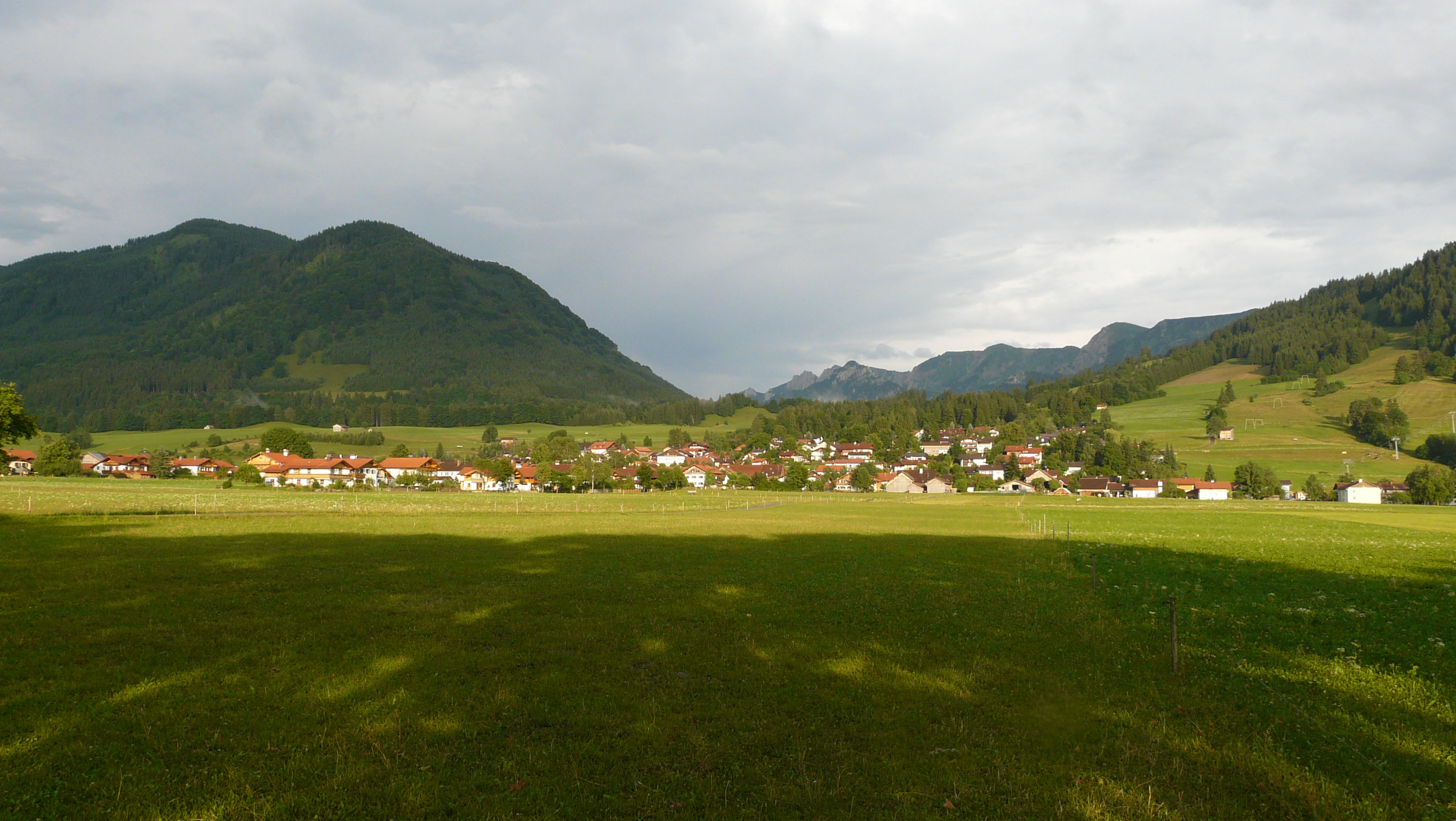 Buching von Westen, Halblech